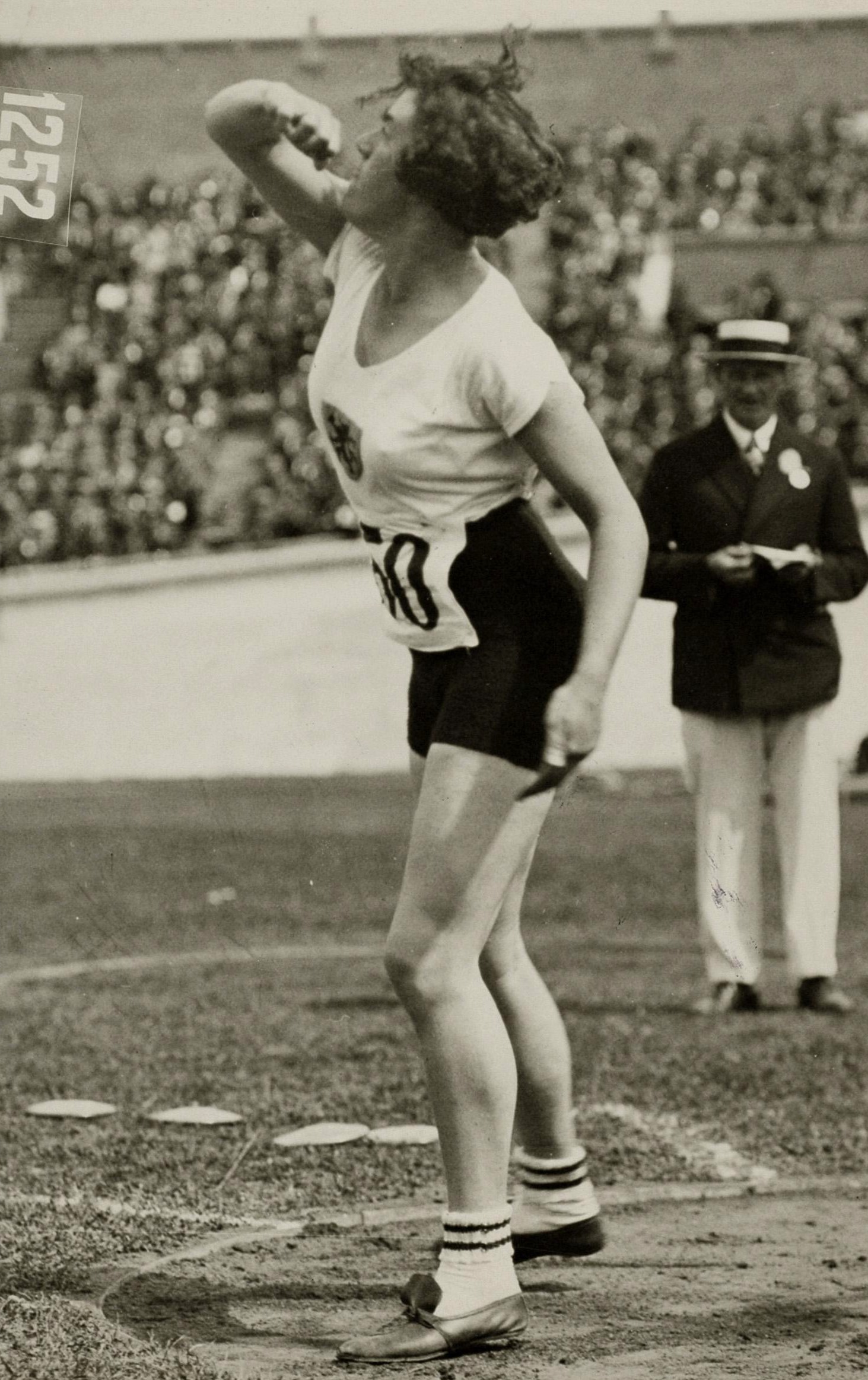 Sport. Olympische Spelen 1928 Amsterdam, Nederland. Atletiek, discuswerpen dames. De Nederlandse H.C. Michaelis werpt hier met haar discus 31.04 m.